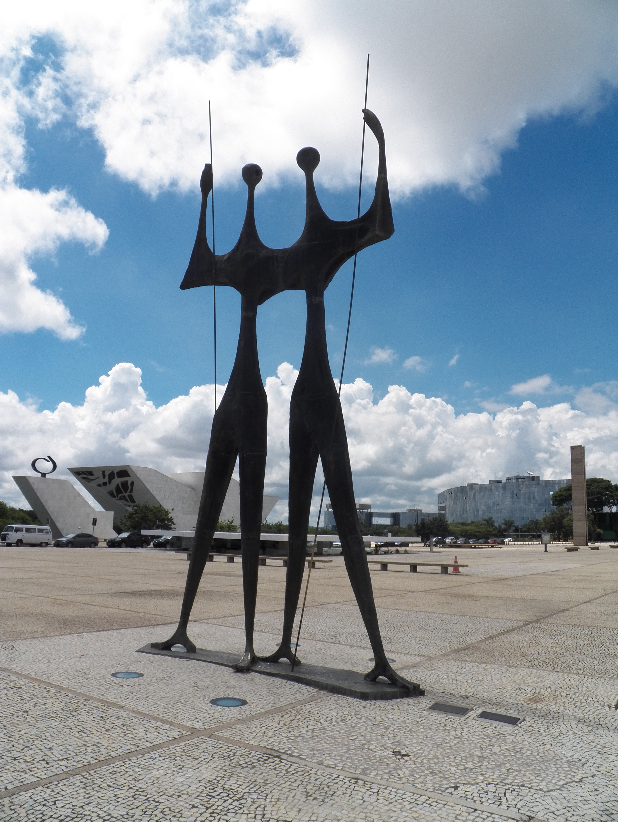 Candangos, monumento localizado na Praça dos Três Poderes em Brasília.